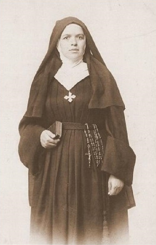 Siostra Jadwiga Borzęcka CR